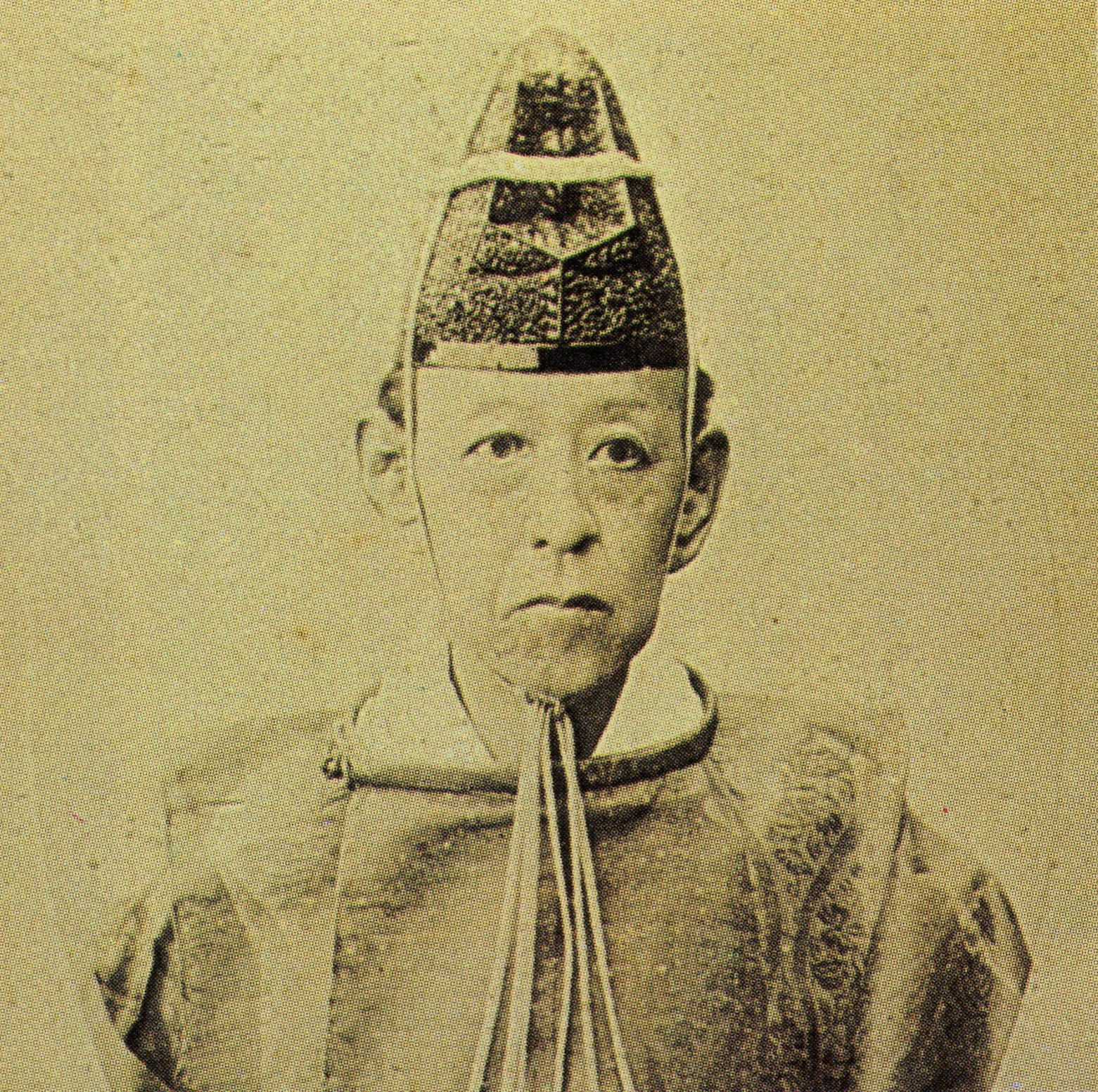 諏訪忠誠の肖像写真。